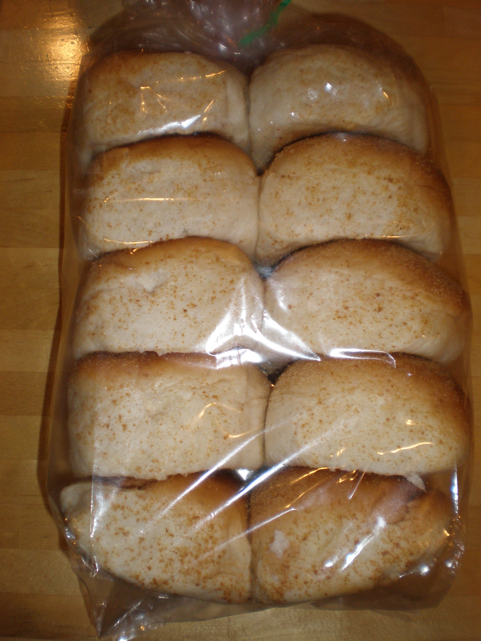 A bag of pandesal